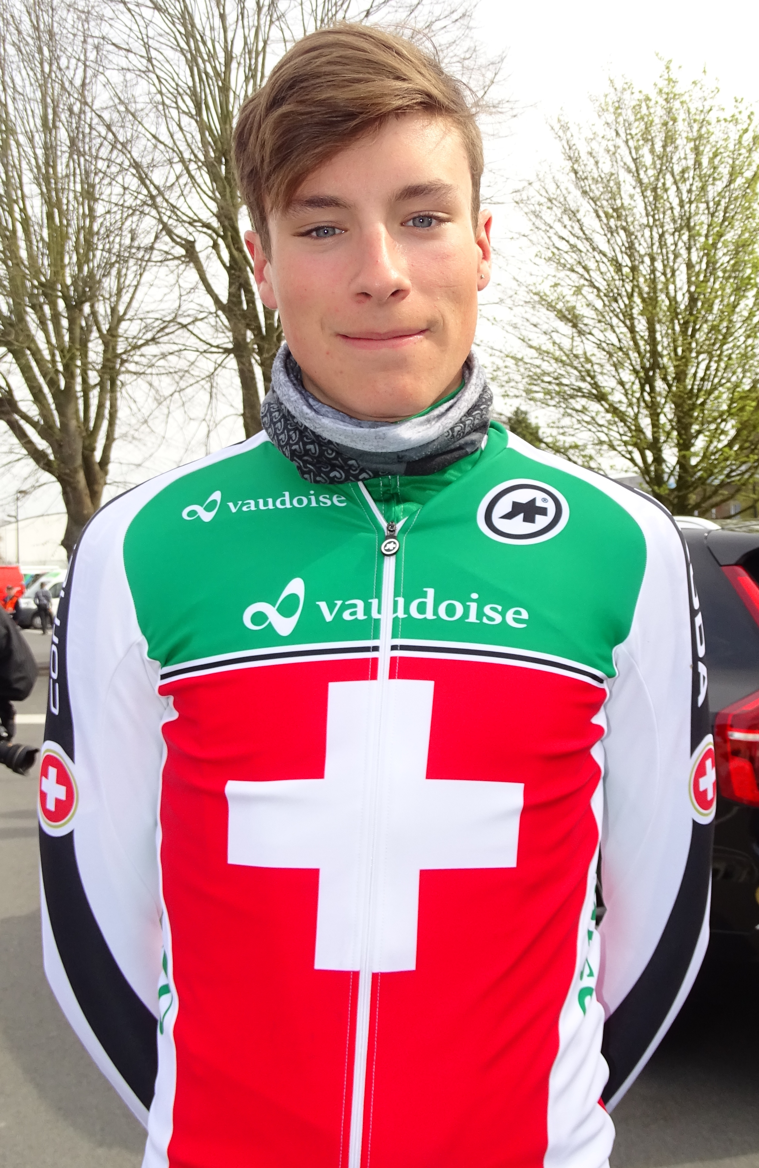 Reportage réalisé le samedi 9 avril à l'occasion du départ et de l'arrivée du Tour des Flandres espoirs 2016 à Audenarde, Belgique.